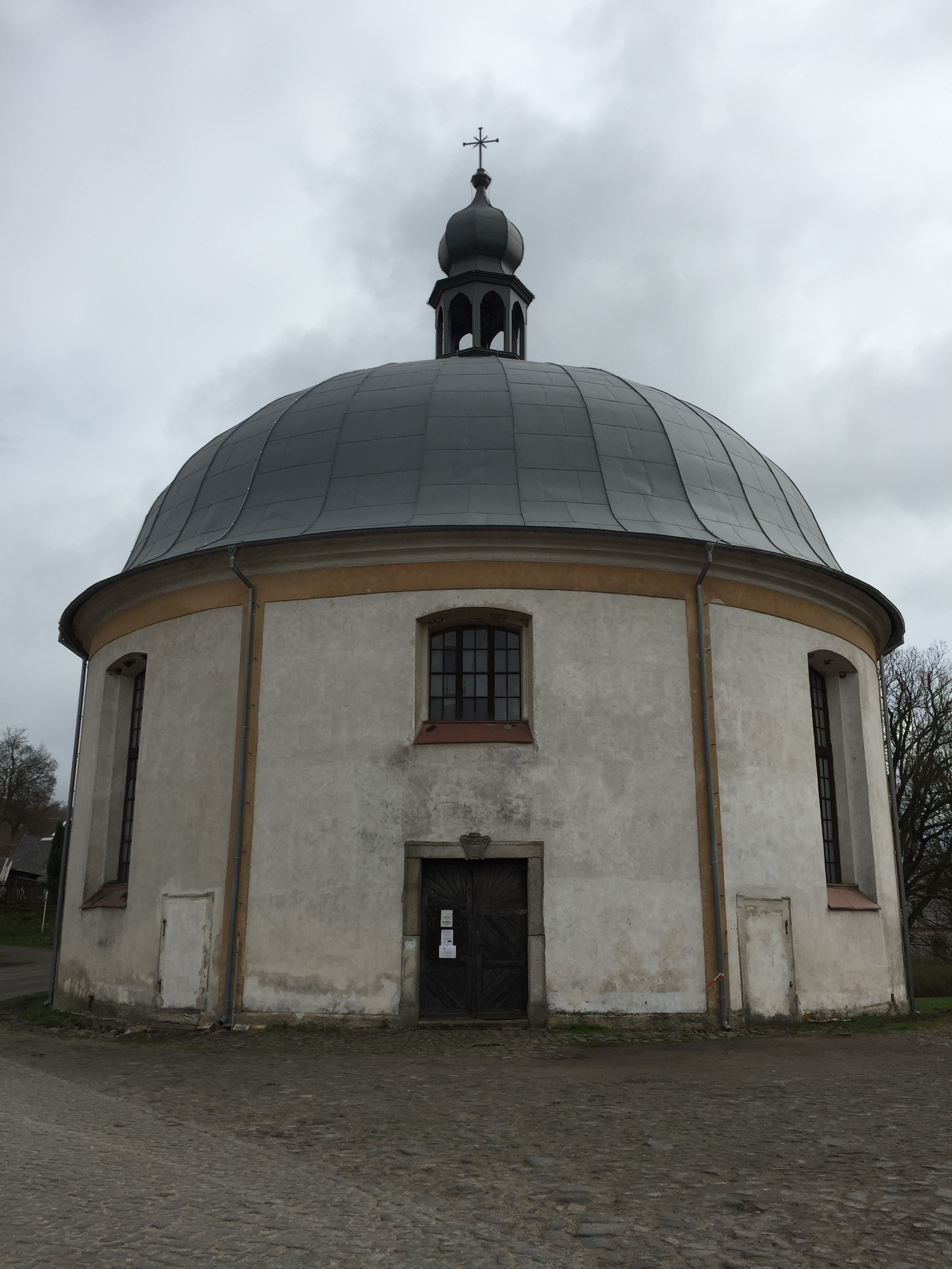 Vstup do kostela Povýšení svatého Kříže v Levíně